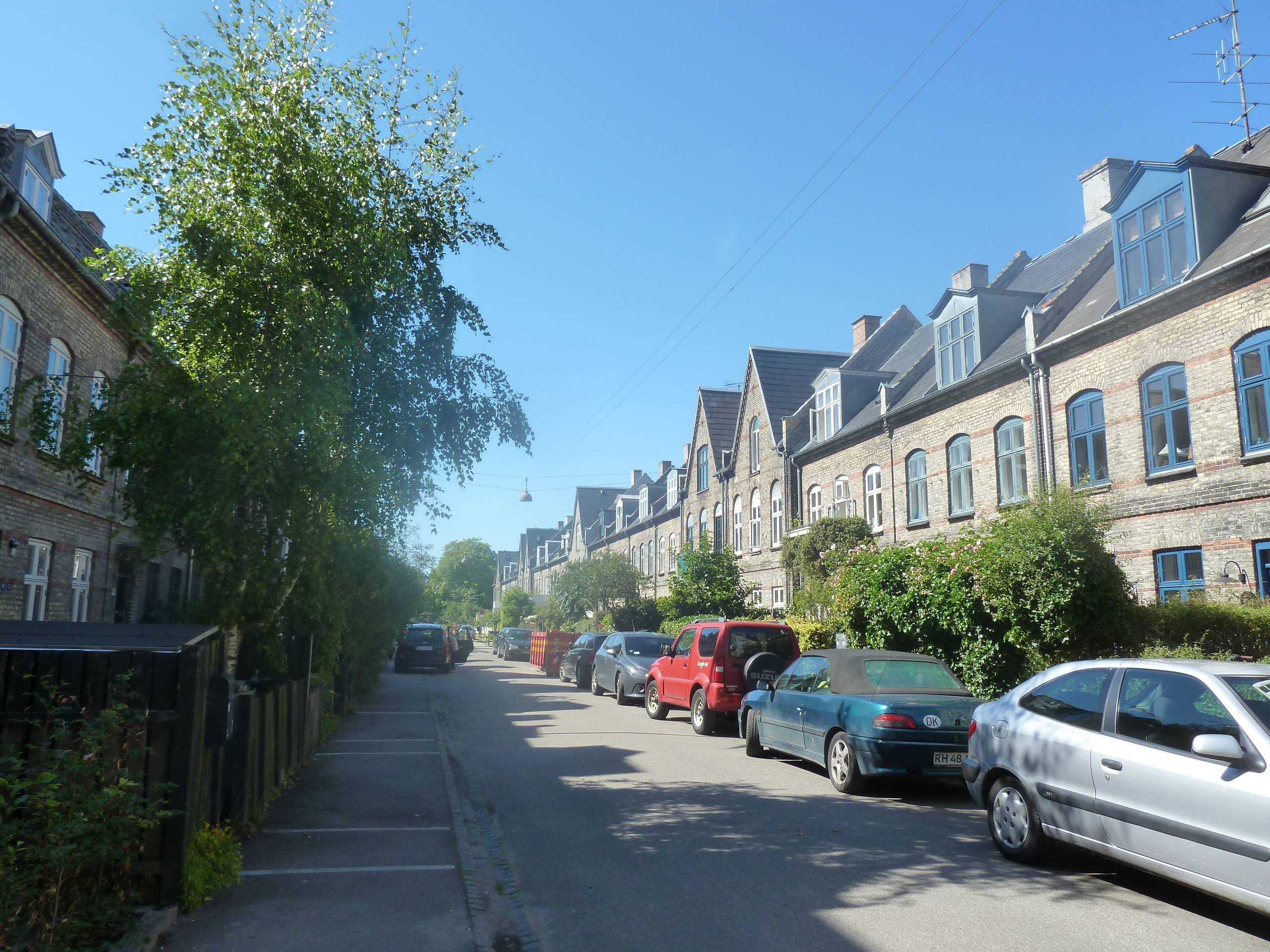 The street Abildgaardsgade, a part of Kartoffelrækkerne, in Østerbro in Copenhagen.